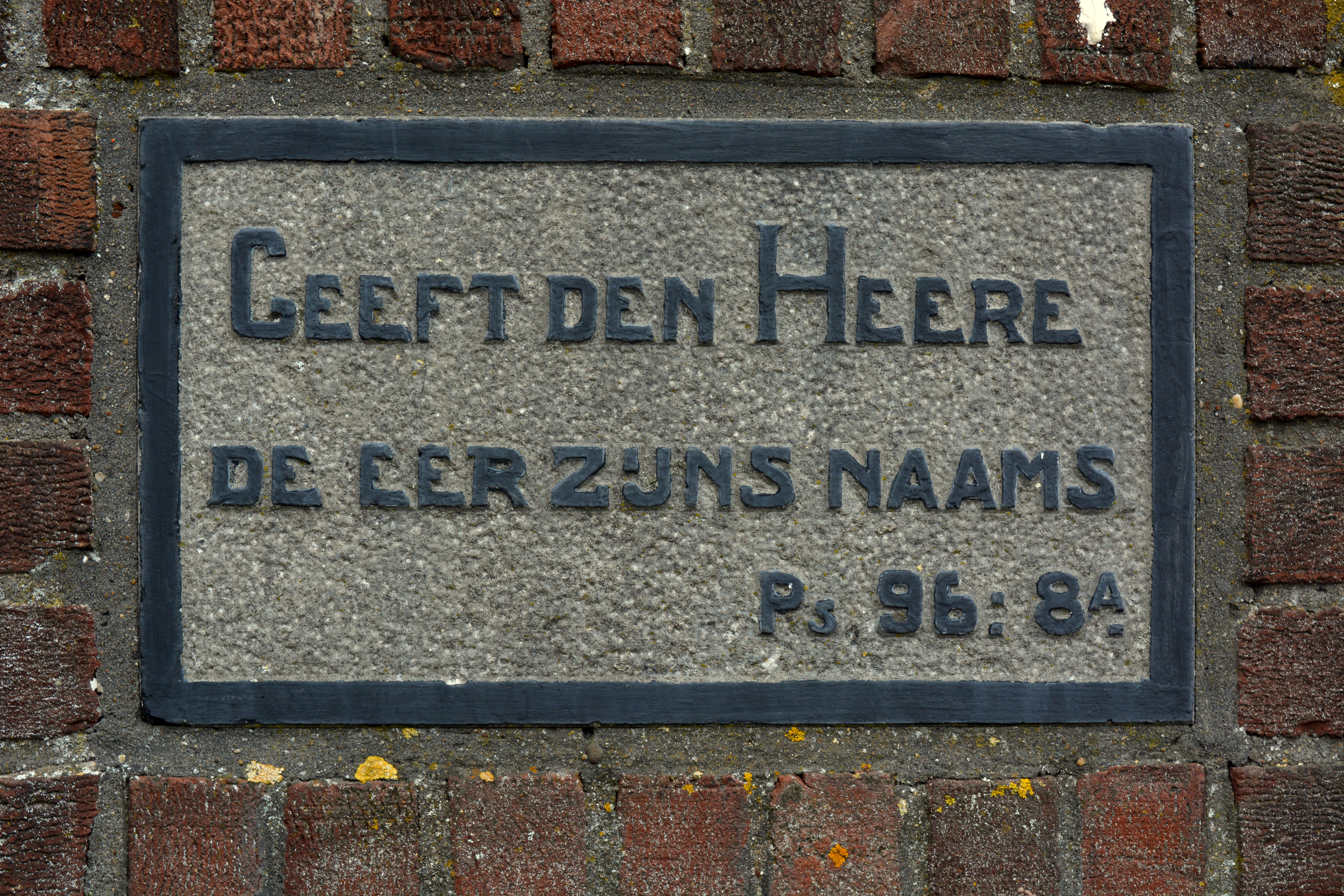 Grifformearde tsjerke fan Ljussens, gevelstien